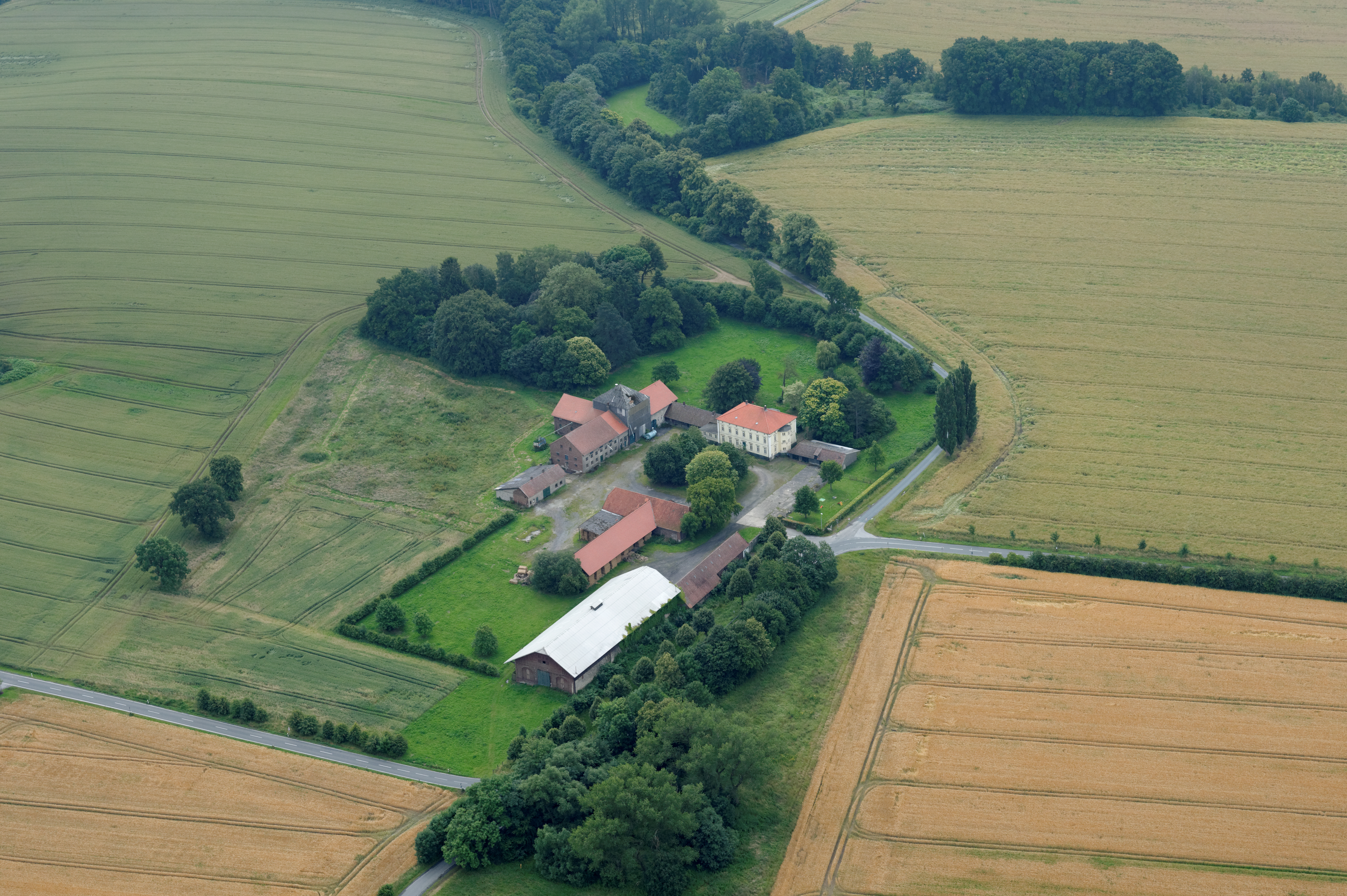 Fotoflug Sauerland Nord: Gut Scheda (früher Kloster Scheda) in Wickede (Ruhr)-Wiehagen. Die Bereiche außerhalb des Gutsgrundstücks (Acker vorne/links, bis zum Gebüsch oben) liegen im Landschaftsschutzgebiet „Strullbachtal“ (Kreis Soest); die baumbestandenen Bereiche oben rechts im Bild liegen im Landschaftsschutzgebiet „Fröndenberg-Ost“ (Märkischer Kreis).